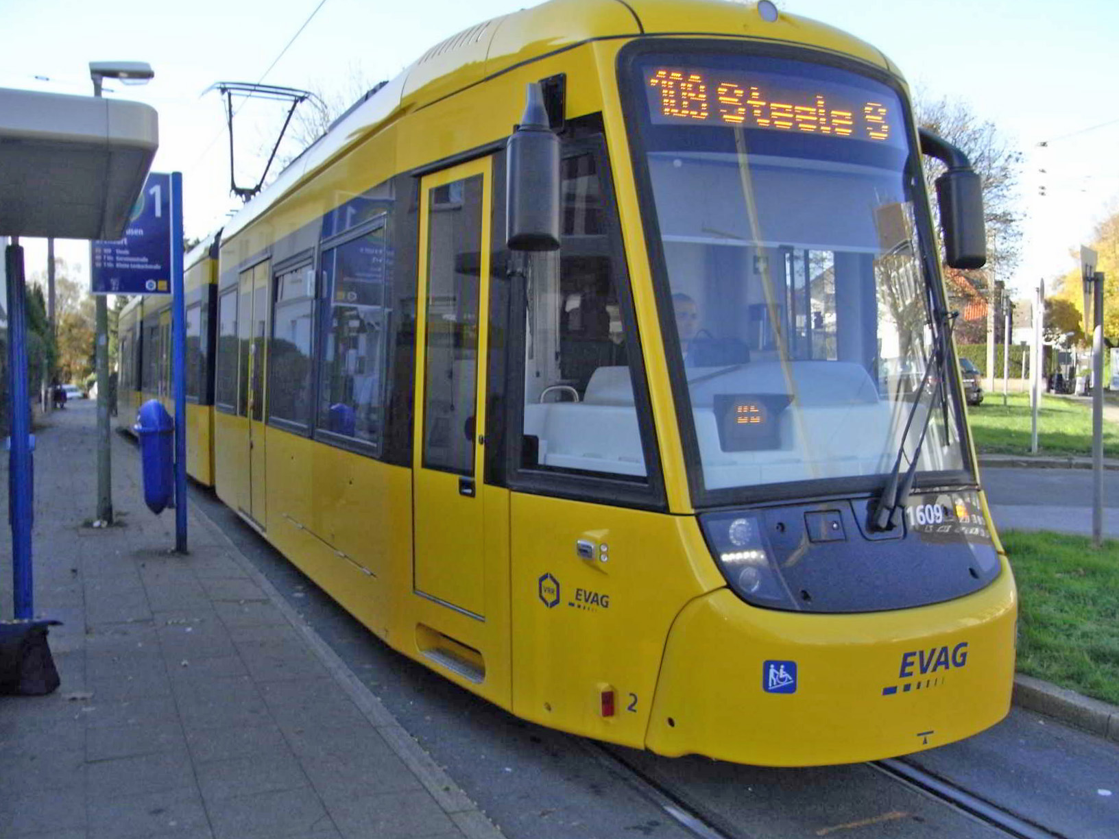 Eine Straßenbahn des Typs NF2 in Frohnhausen, Breilsort